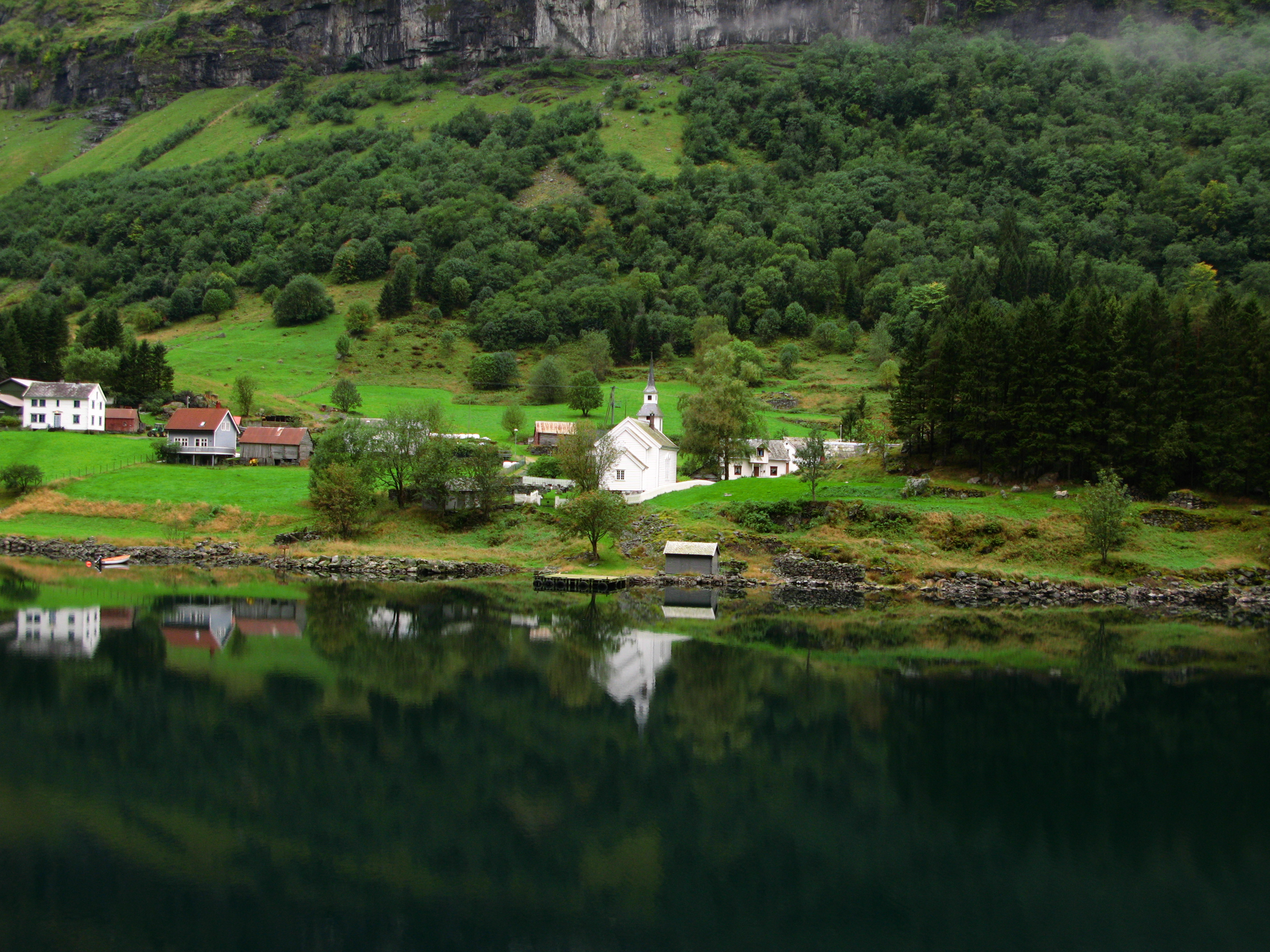 Bakka church by Nærøyfjorden